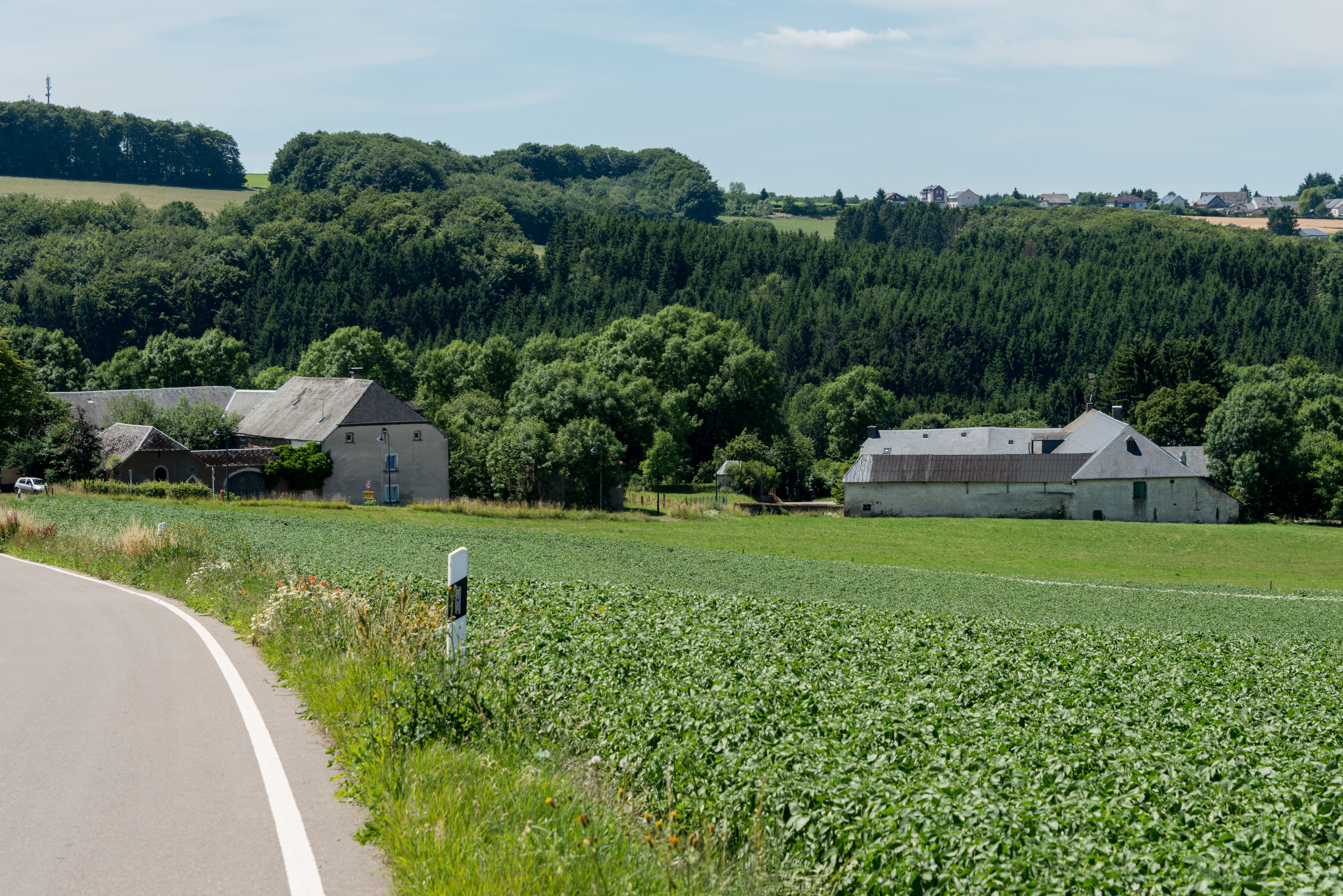 Vue op Brattert vum CR306B; lénks déi fréier «Erkelsvogtei» («Lonkigsvogtei»), riets den Haff «An Thillen».